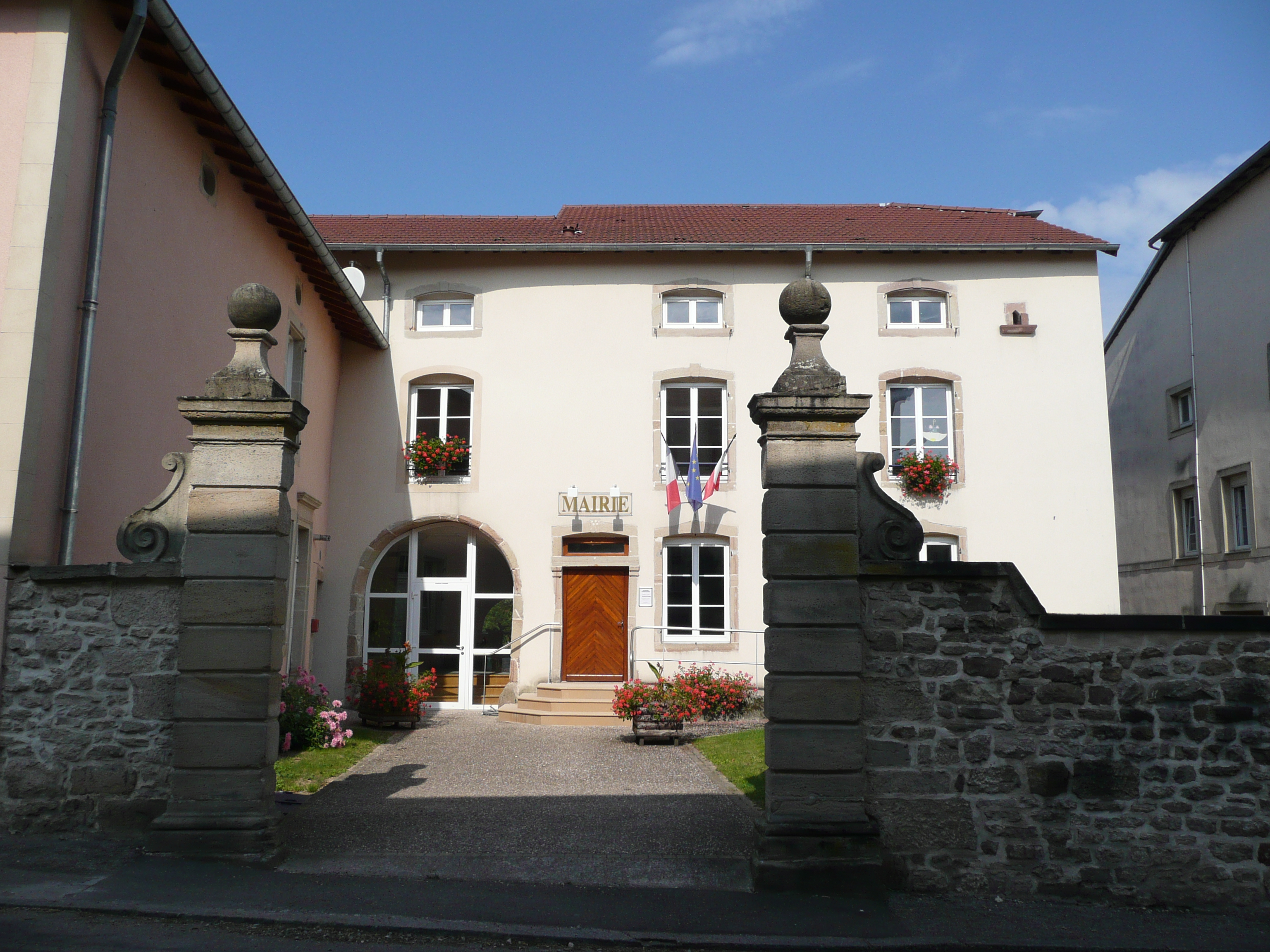 Mairie de Bleurville